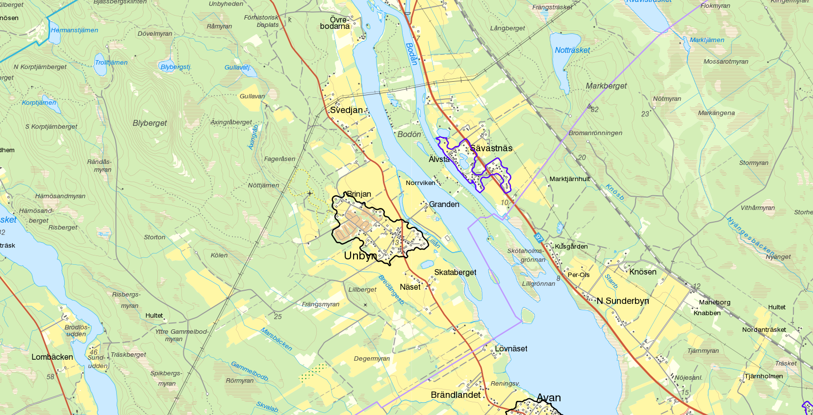 Unbyns tätort med svart gräns 2015. Bakgrundskarta från Lantmäteriet, skala 1:30 236. På kartan syns även småorten Sävastnäs (lila gräns) och delar av tätorten Avan.